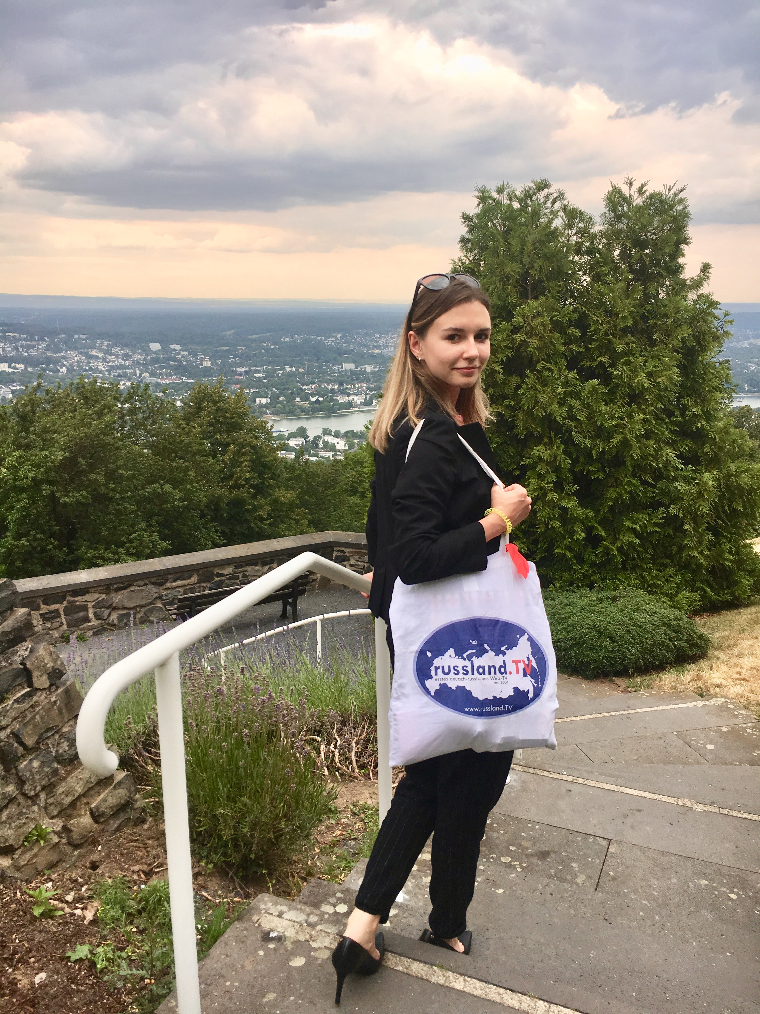 Die Moskauerin Julia Dudnik von Russland.news / Russland.tv am Rande des 18. Petersburger Dialogs auf dem Petersberg bei Bonn, von wo sie vom Treffen der Außenminister Sergej Lawrow und Heiko Maas berichtete.